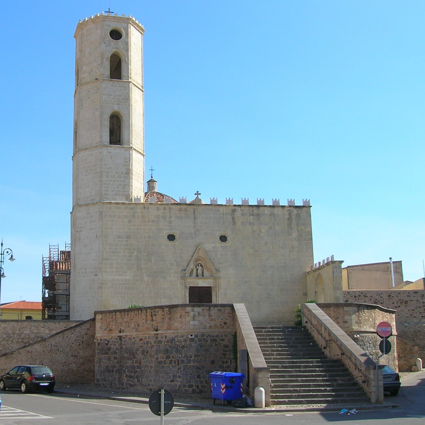 Basilica di San Leonardo - Serramanna